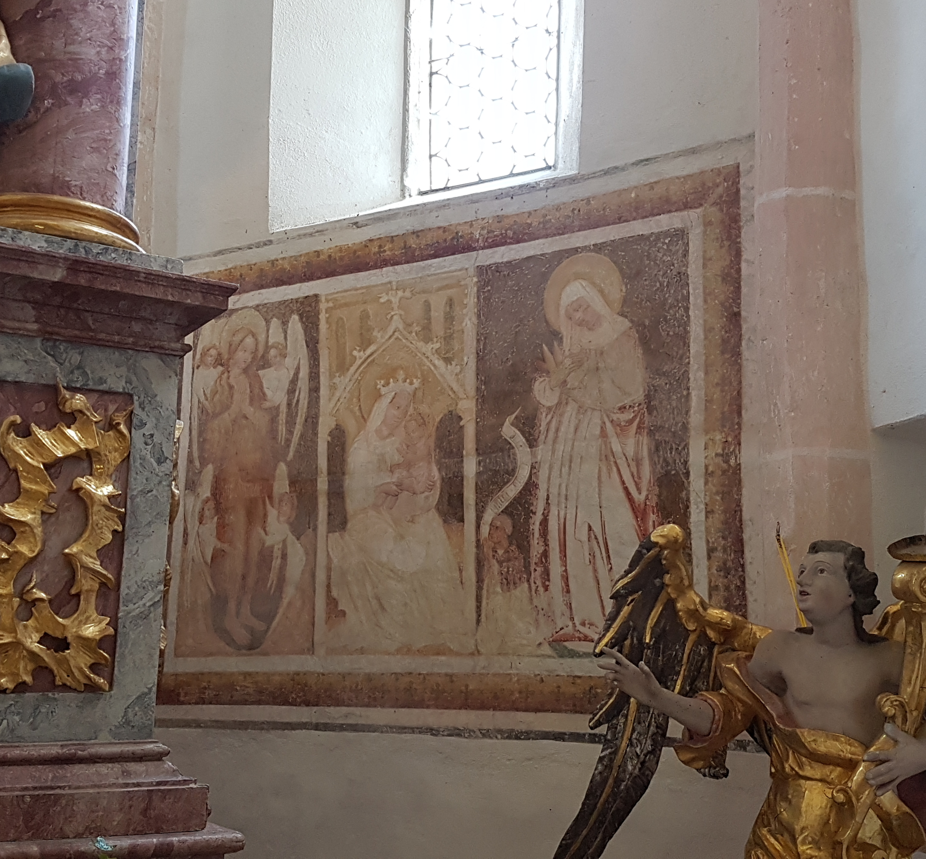 Maria Himmelfahrt (Kirchhof)